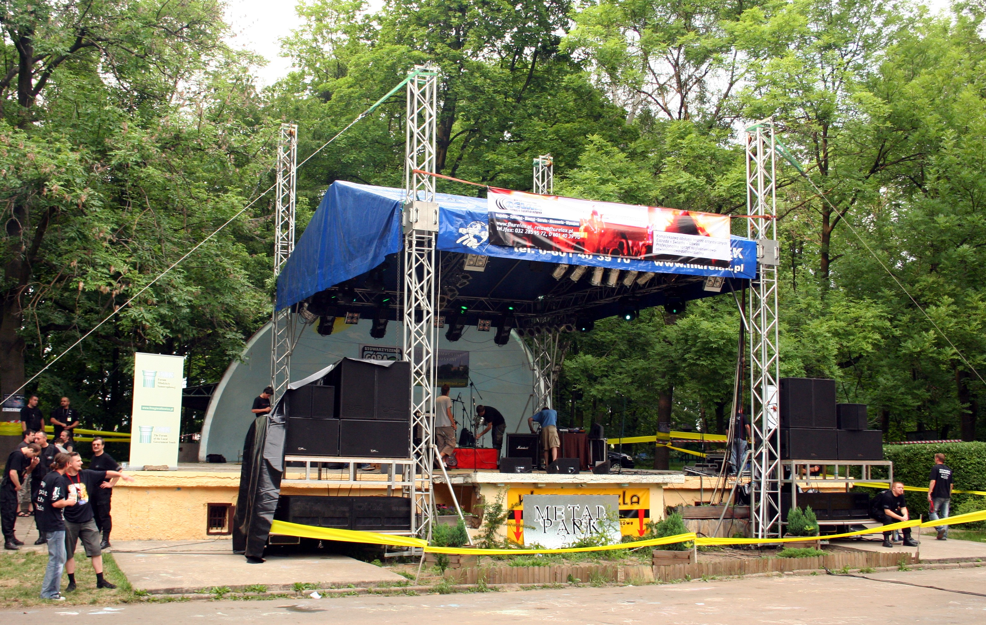 Tarnowskie Góry - muszla koncertowa na terenie parku